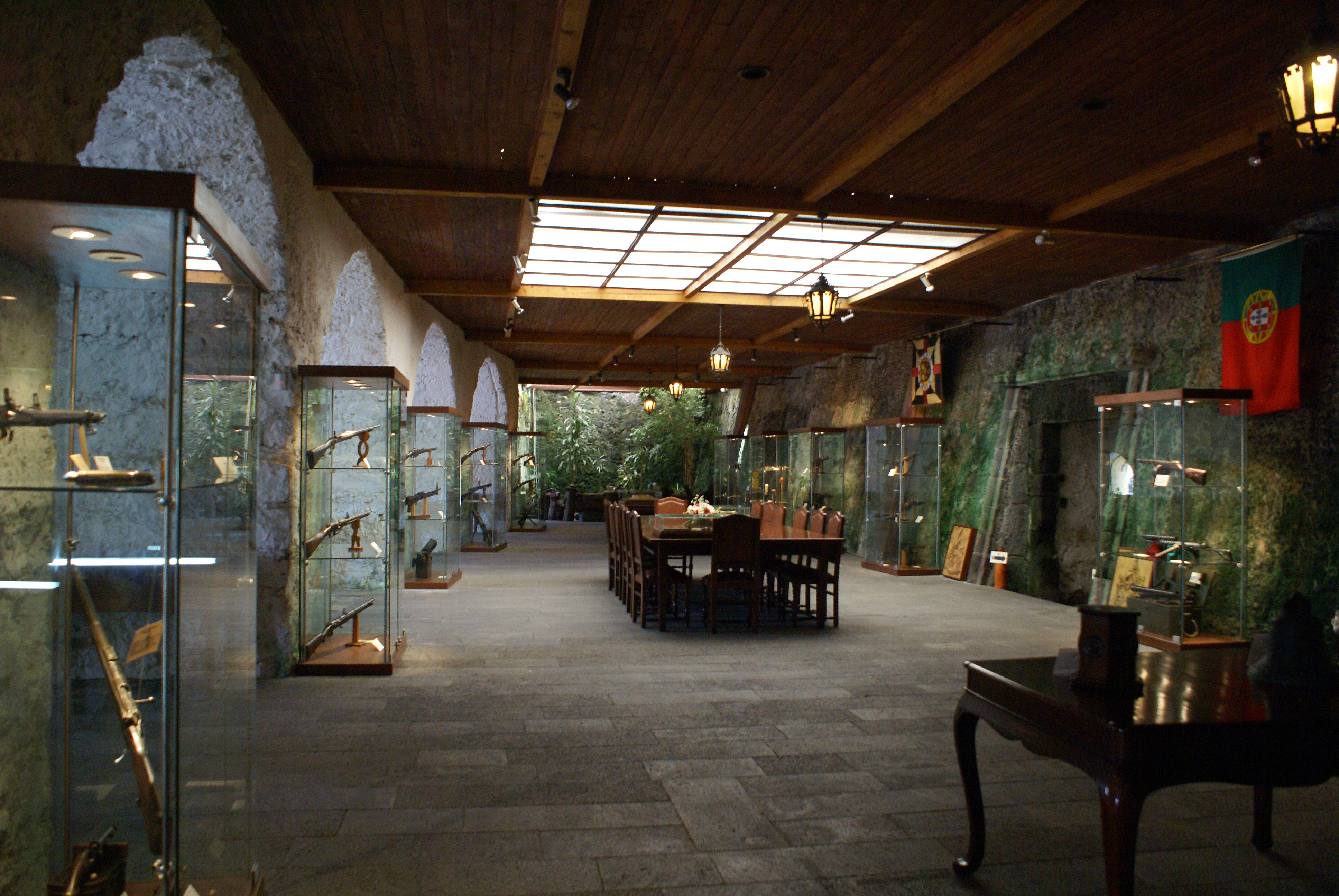 Forte de São Brás, Museu, Ponta Delgada, ilha de São Miguel, Açores